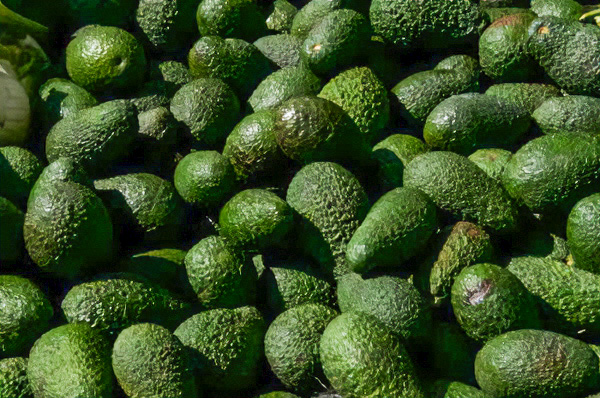 אבוקדו מזן האס בשוק ואדי ניסנאס